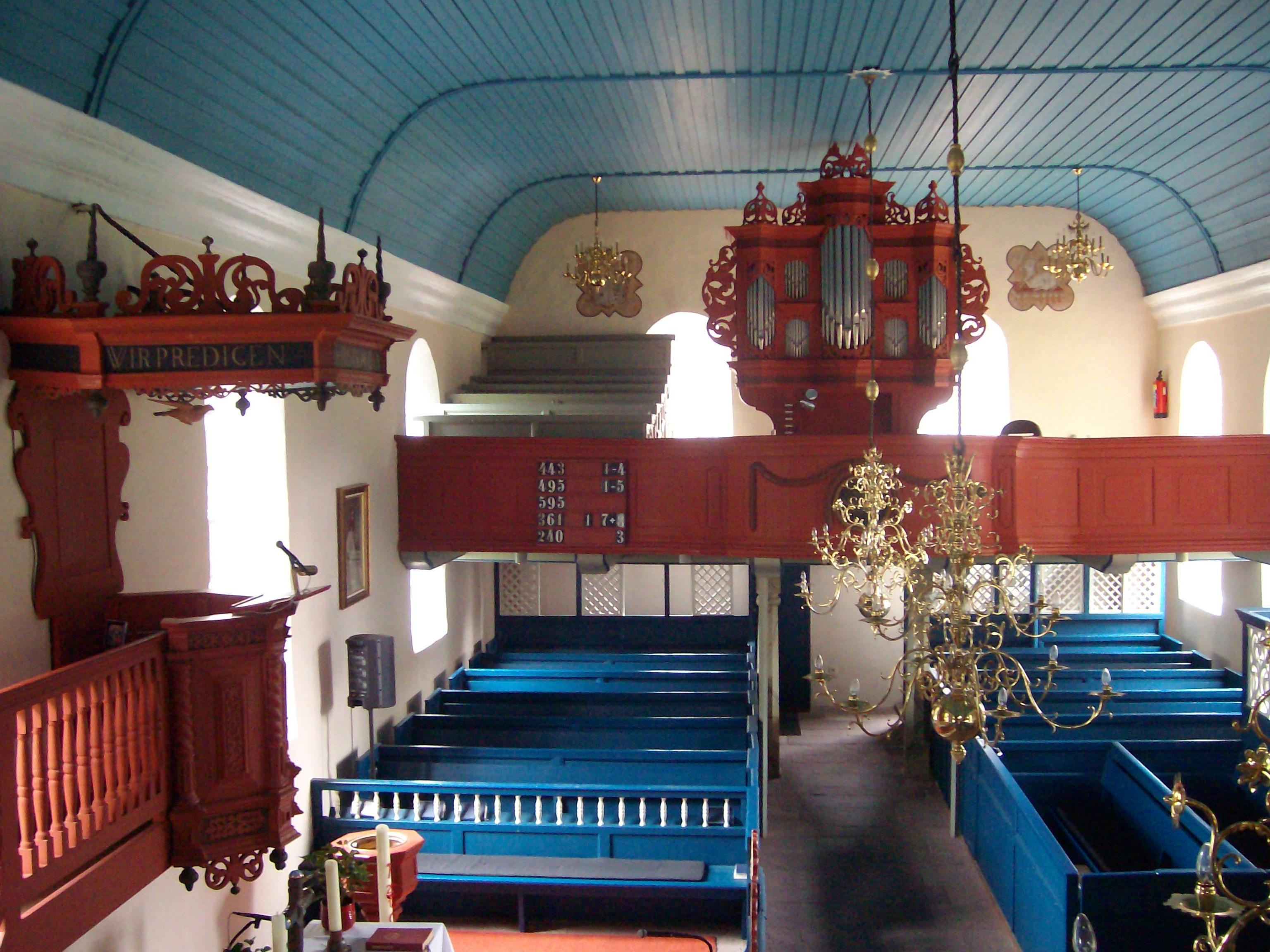 Innenraum der Reformierten Kirche in Hatshausen